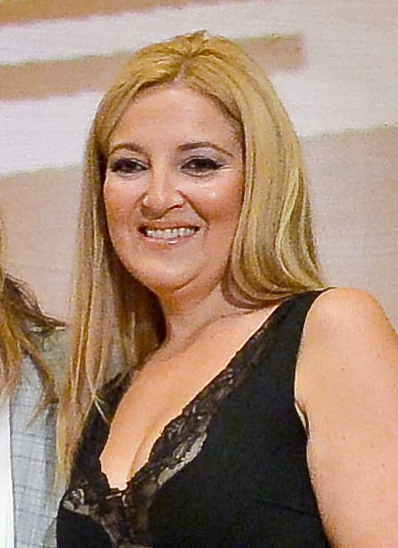 14.10.29-Grupo-2-Premios IDEAL